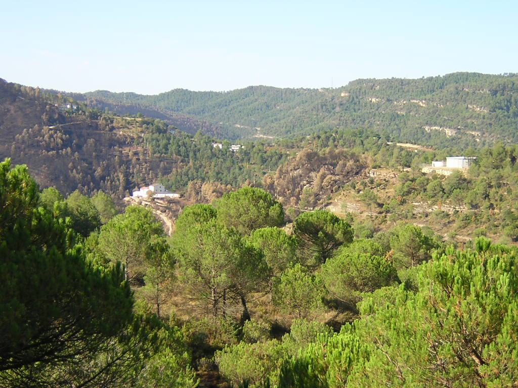 Monistrol de Calders (Moianès)